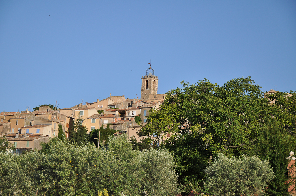 Puimoisson, le village